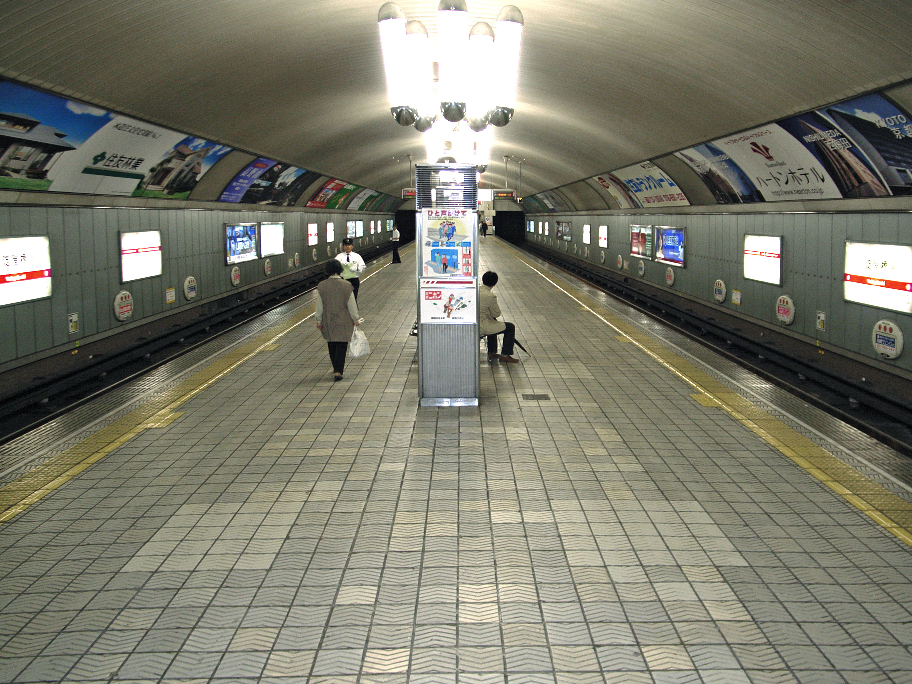 地下鉄淀屋橋駅構内、撮影日：平成18年5月13日。